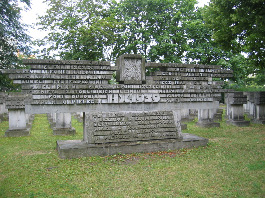 Gdansk, Poland, Zaspa Cemetery - monument of those killed in Szymankowo